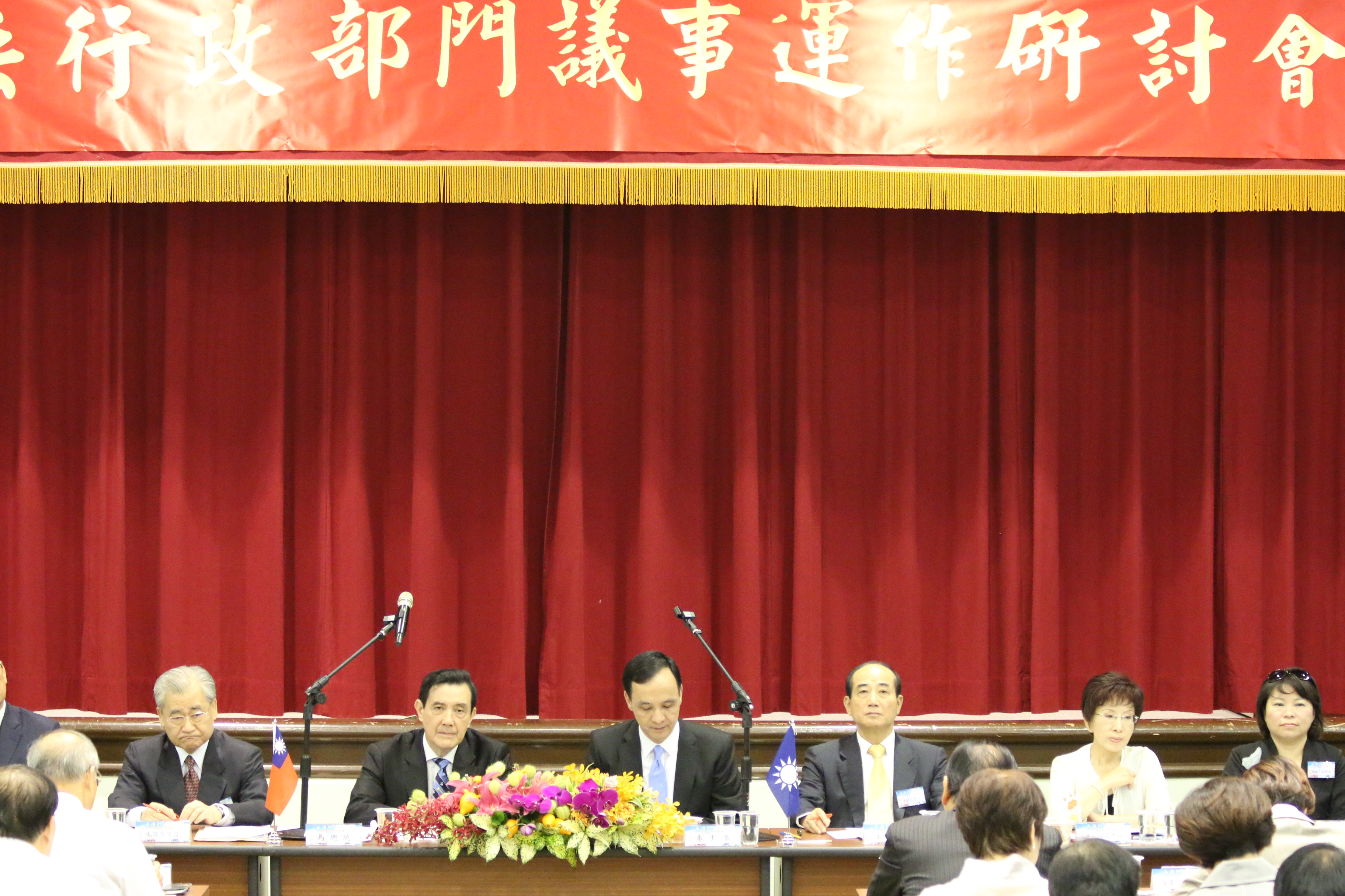 中文（台灣）: 國民黨立法行政部門議事運作研討會(美國之音楊明)